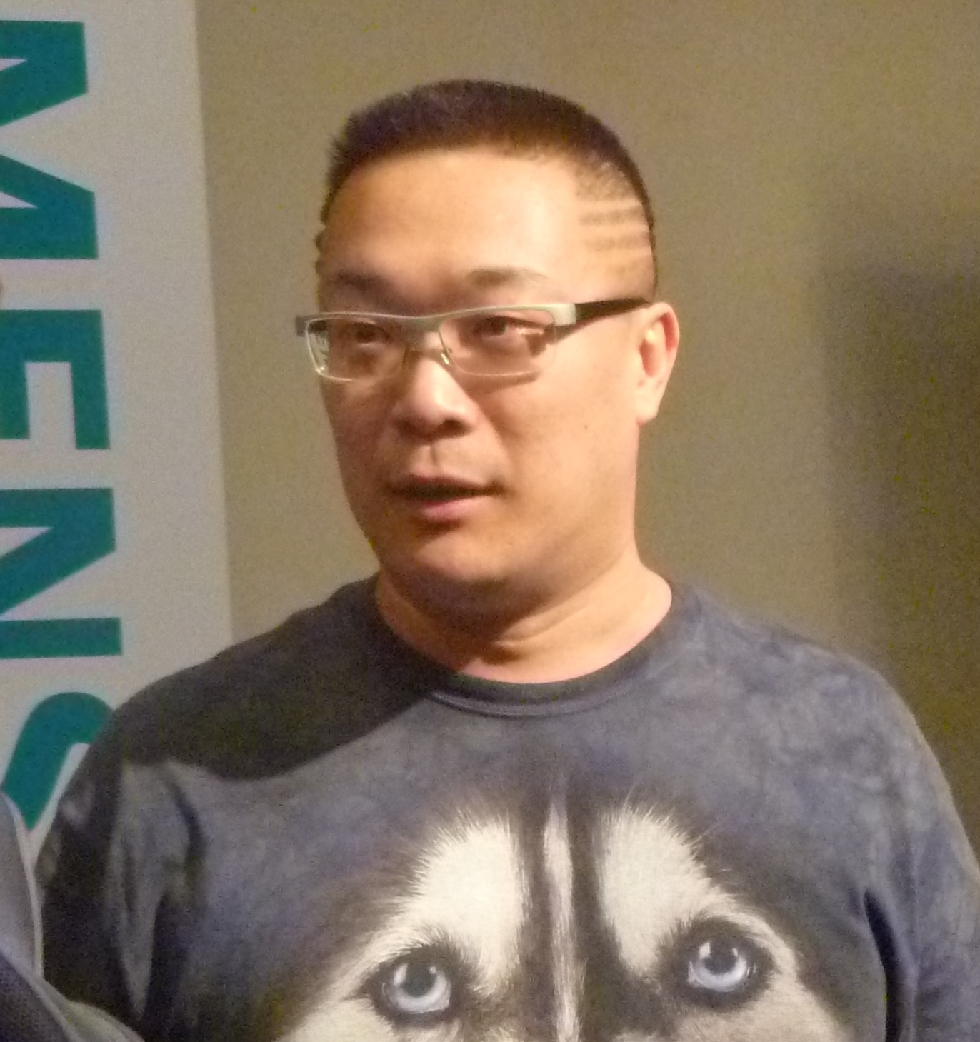 中文（台灣）: 朱學恆在「改變決定未來」Green+校園論壇的演講。